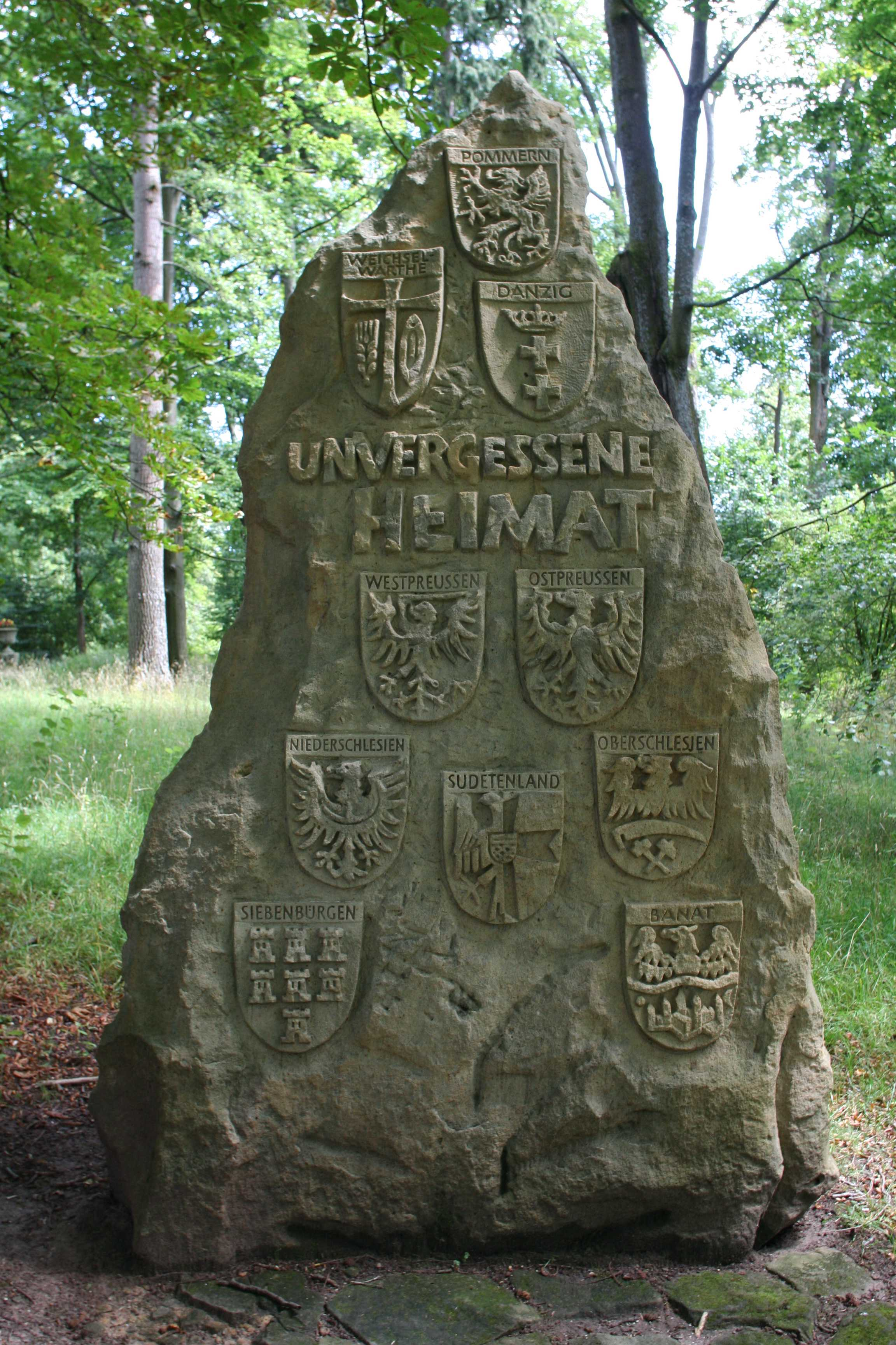 „Gedenkstein für die Vertriebenen im Coburger Hofgarten